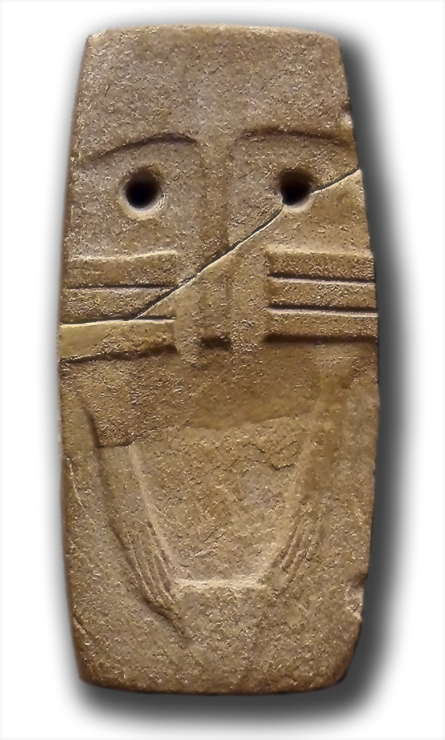 Ídolo-Placa prehistórico antropomorfo de forma pseudorectangular. Piedra. Sección plana. El anverso de la placa está decorado en relieve formando un rostro con cejas, nariz y un posible tatuaje facial. Así mismo se representan brazos y triángulo púbico. El reverso de la placa muestra incisiones en zig-zag (representación de posibles peinados). Ojos perforados. Calcolítico. Procedente del Dolmen de Guadancil (Garrovillas de Alconétar, Cáceres, Extremadura, España).